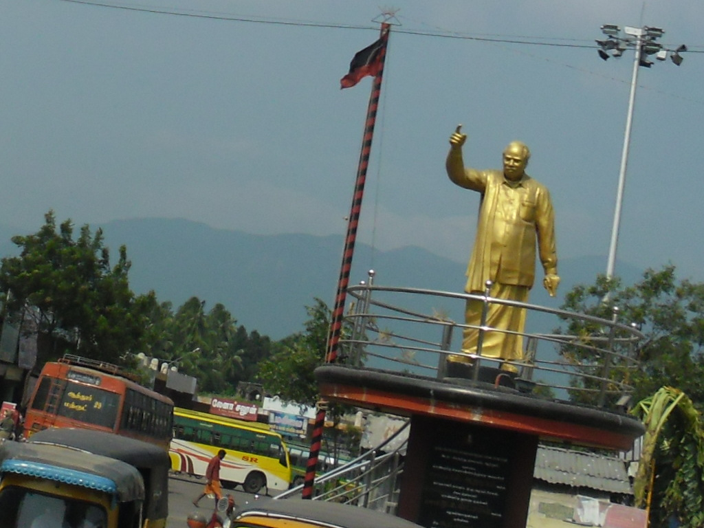 திமுக கொடியுடன் கூடிய அண்ணா சிலை